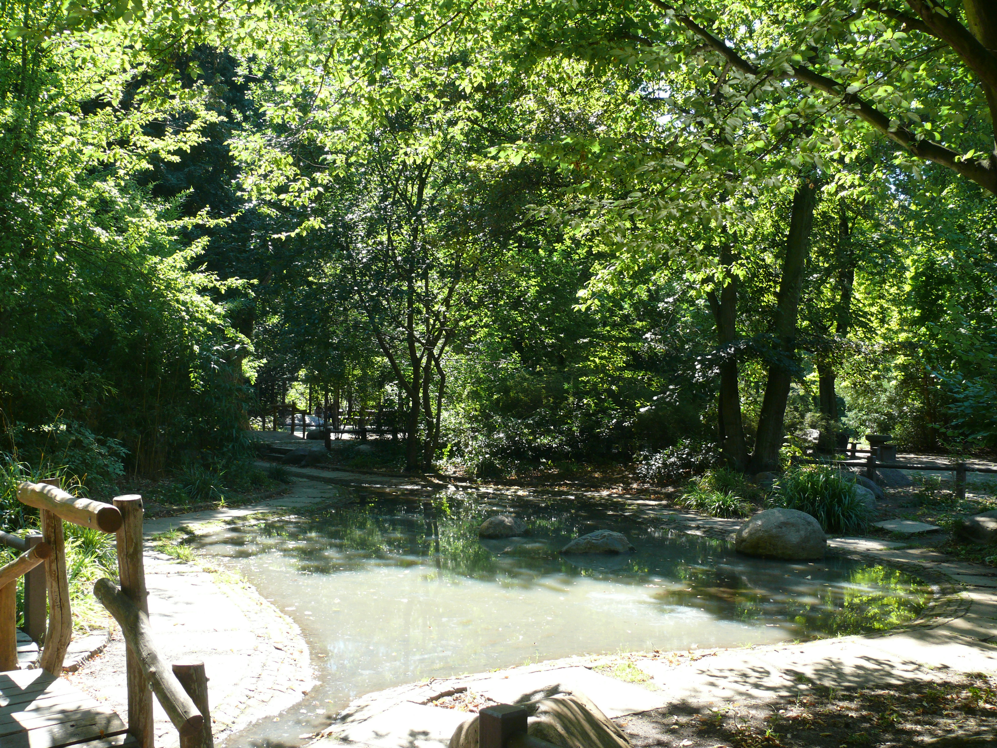 Berlin-Gesundbrunnen Humboldthain